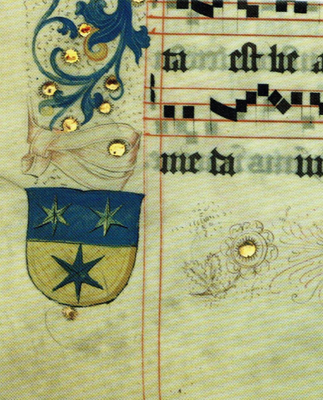 Lorcher Chorbuchblatt (WLB Stuttgart Cod. mus. I fol. 63, Bl. 296v, Ausschnitt) mit Wappen des Lorcher Pfarrkirchenkustos Thomas Köllin